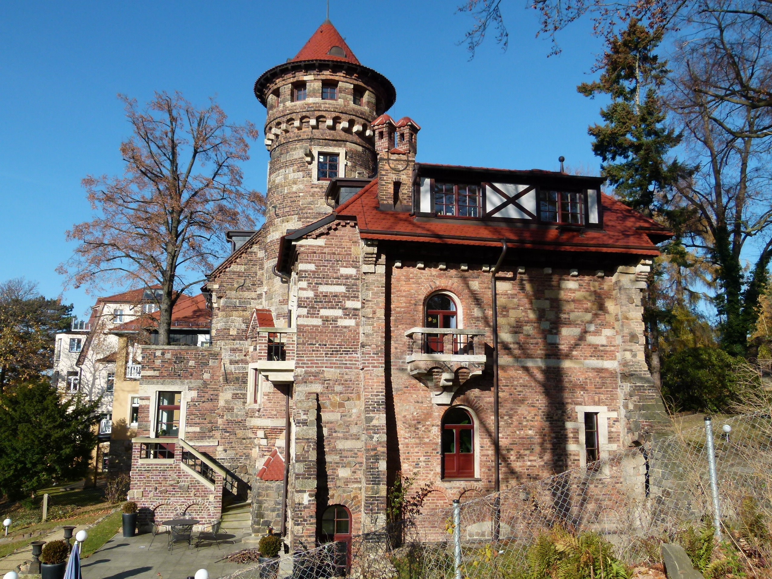 Denkmalgeschütztes Haus, Malerstraße 18, Loschwitz, Dresden